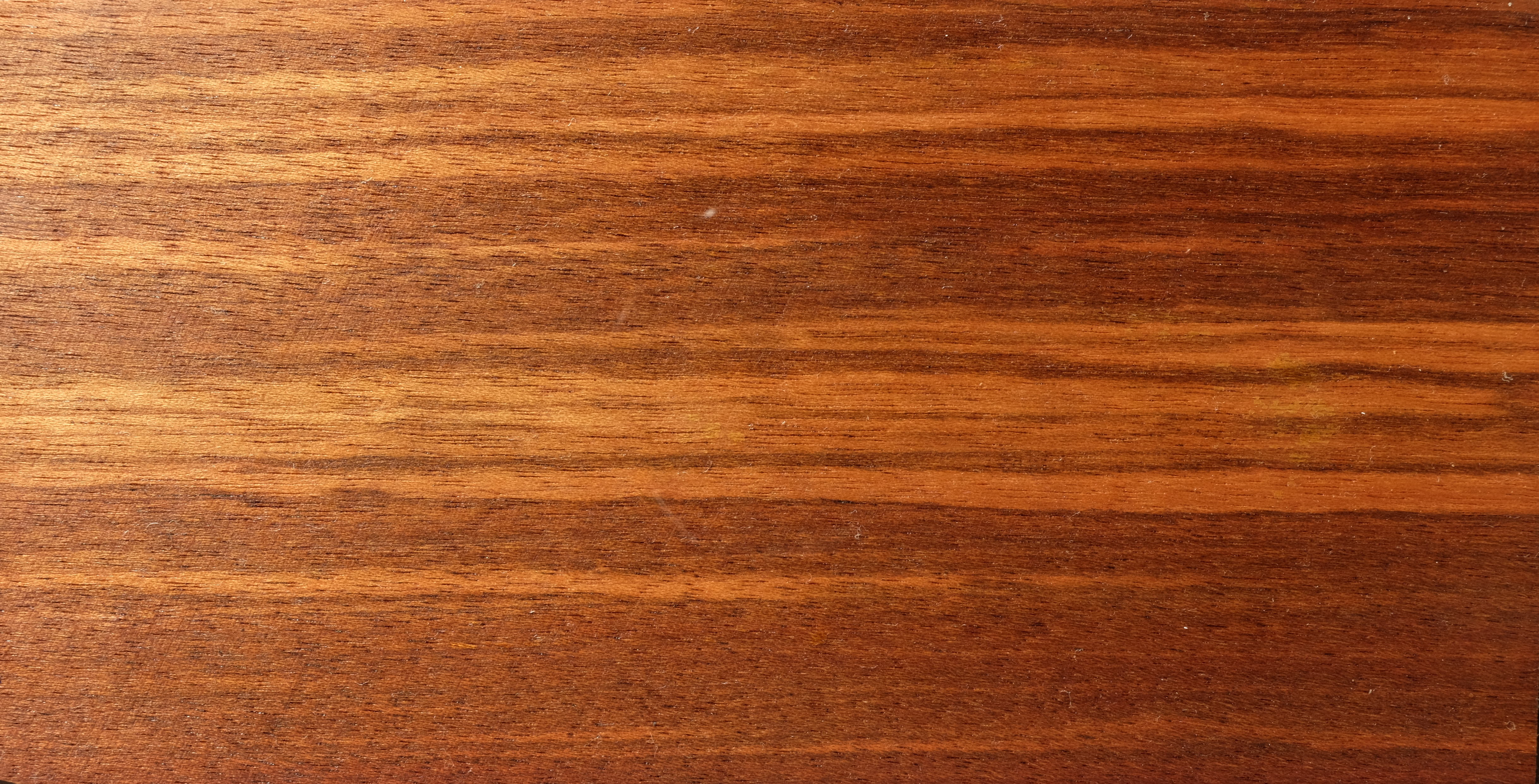 gemessertes Furnier; Holzart: Copaiba, Cupai